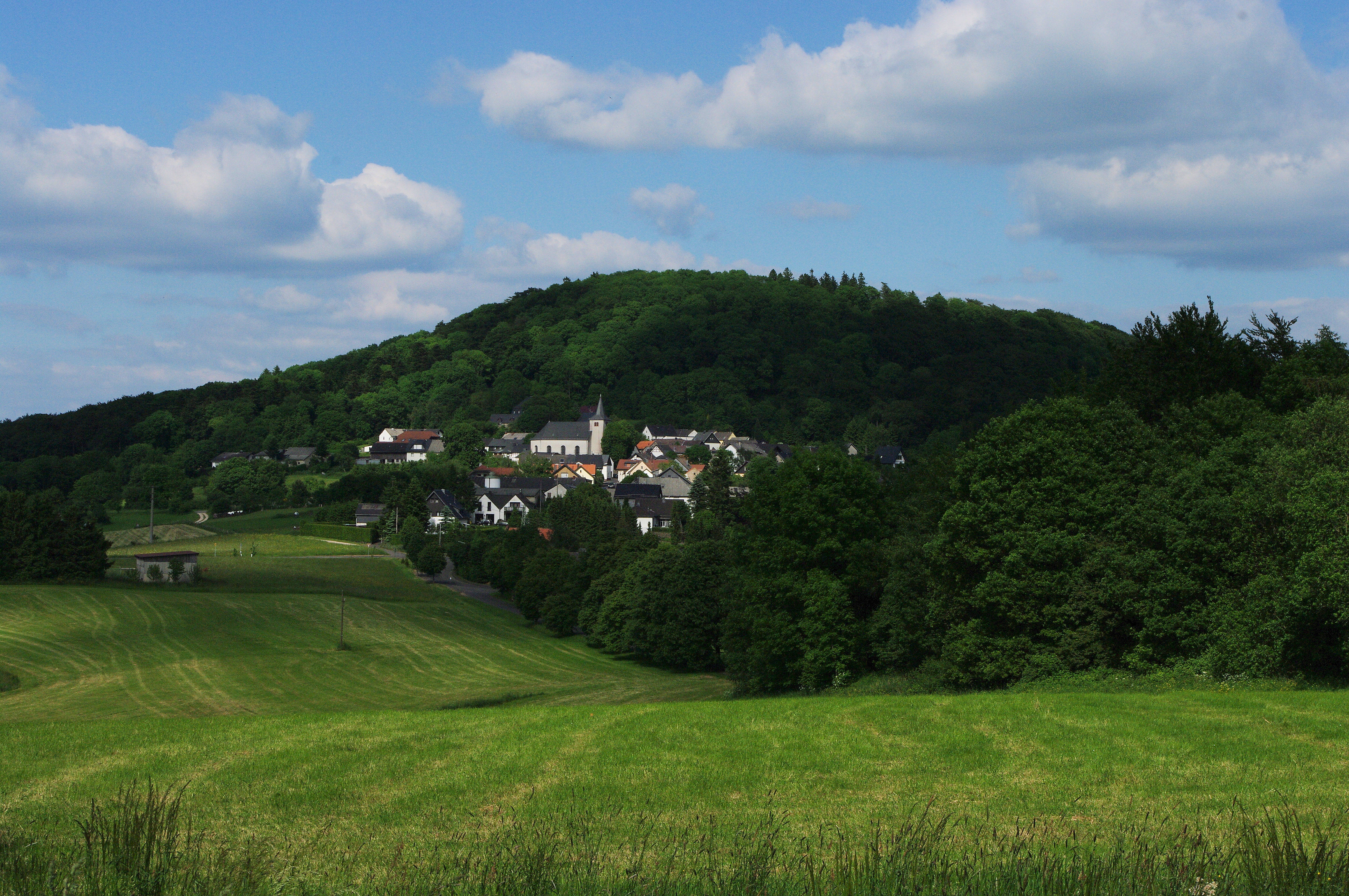 Aremberg sowohl die Ortschaft als auch der tertiäre Vulkankegel